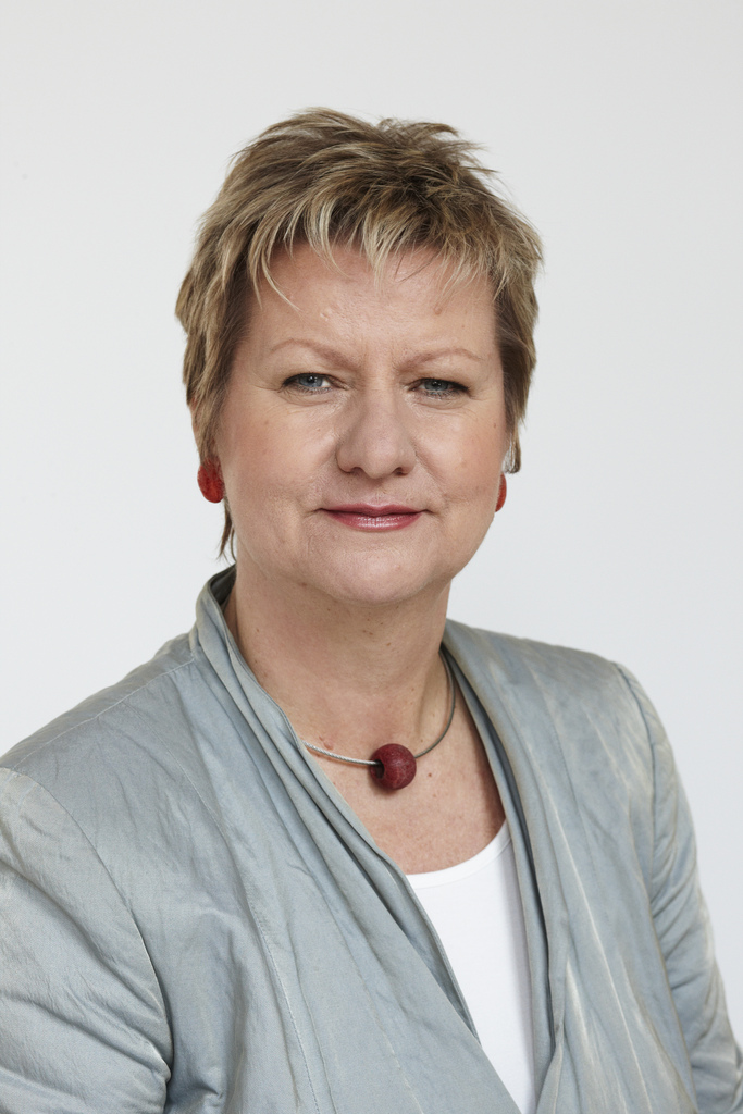 Offizielles Pressefoto von Sylvia Löhrman. Stand: 2010.